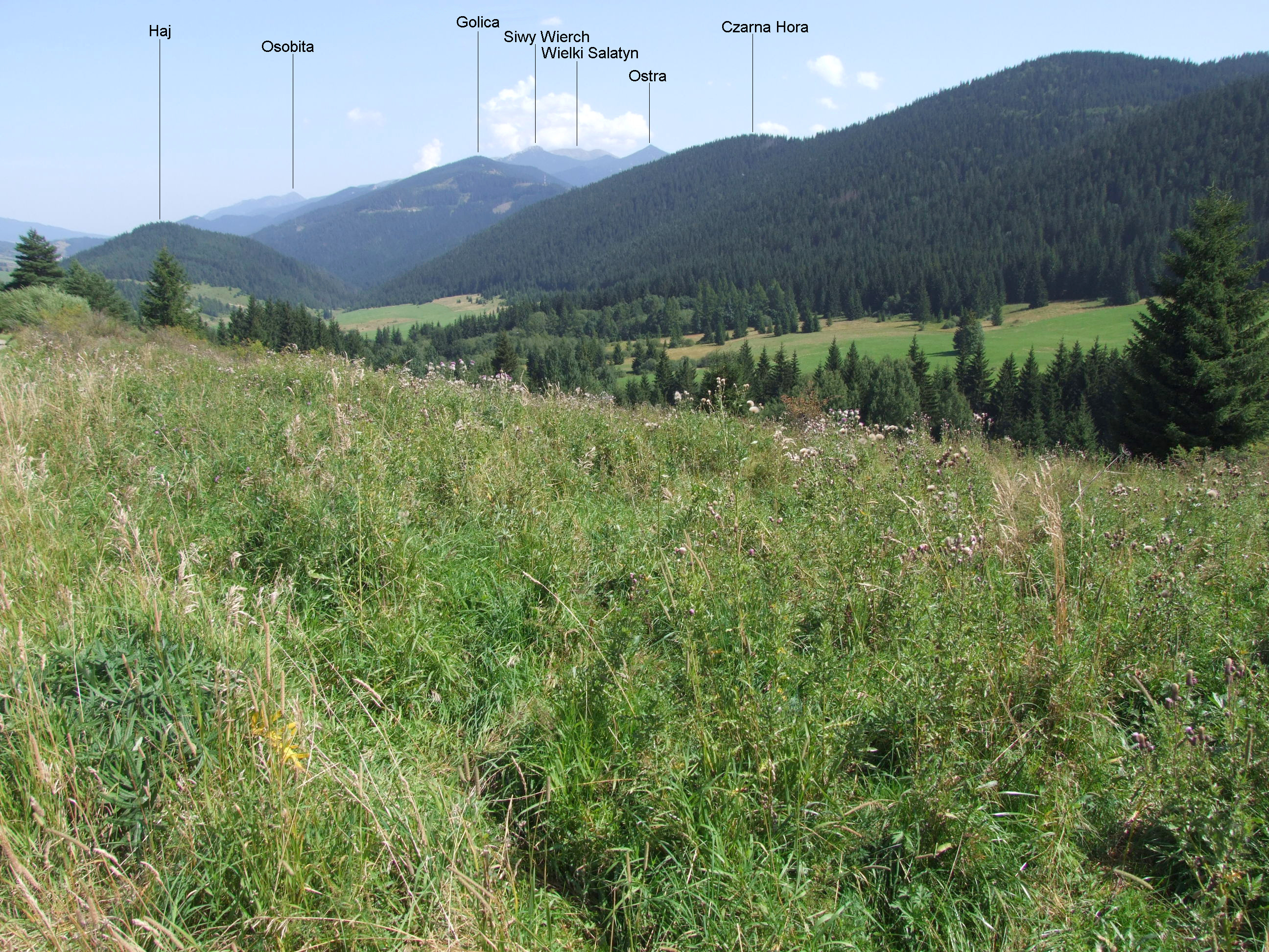 Dolina Borovianki